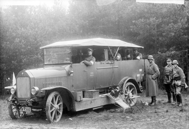 Funker-Wagen der Nachrichten-Abtlg. 5 Feldmanöver der 5. Division in Thüringen 1925